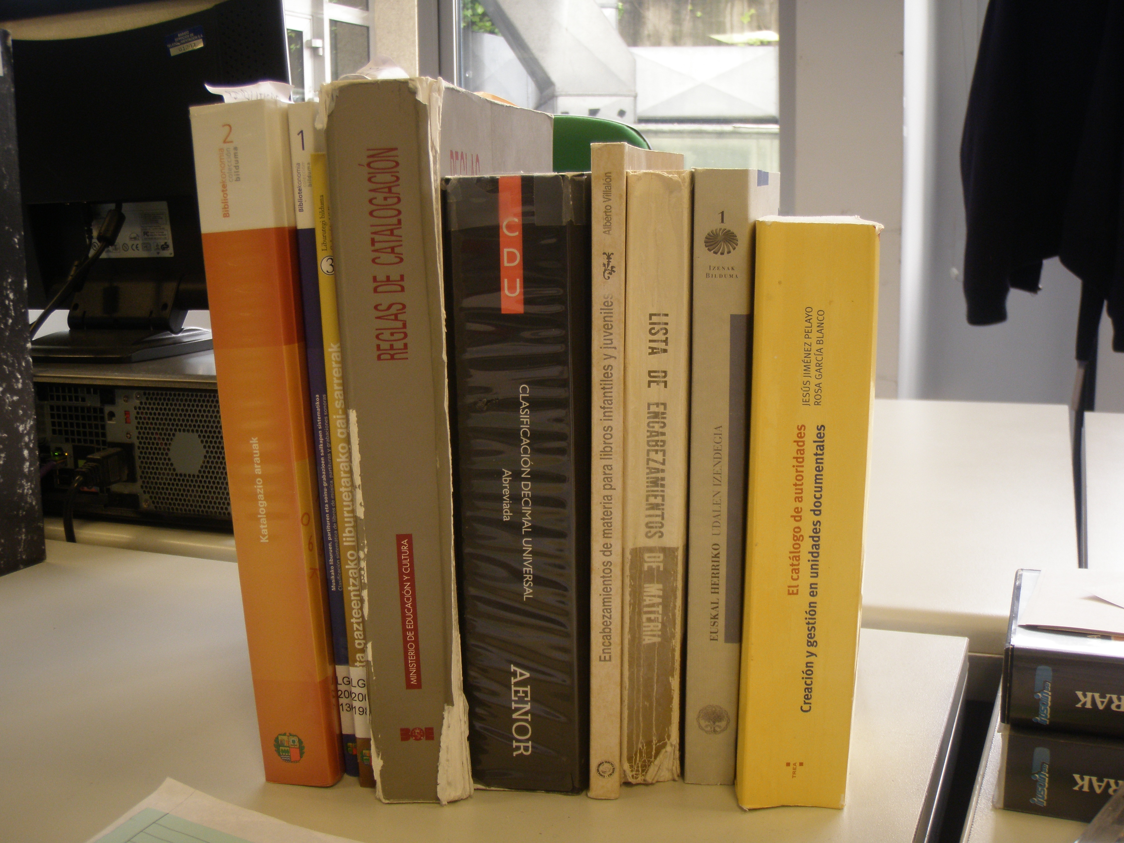 Katalogatzeko liburuak